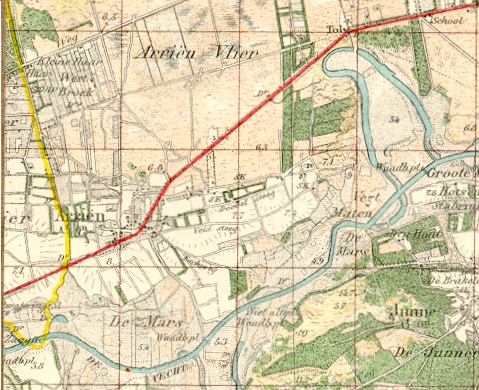 Arriën in 1915. Fragment van topografische kaart uit 1915. Auteursrechten vanwege ouderdom verlopen.